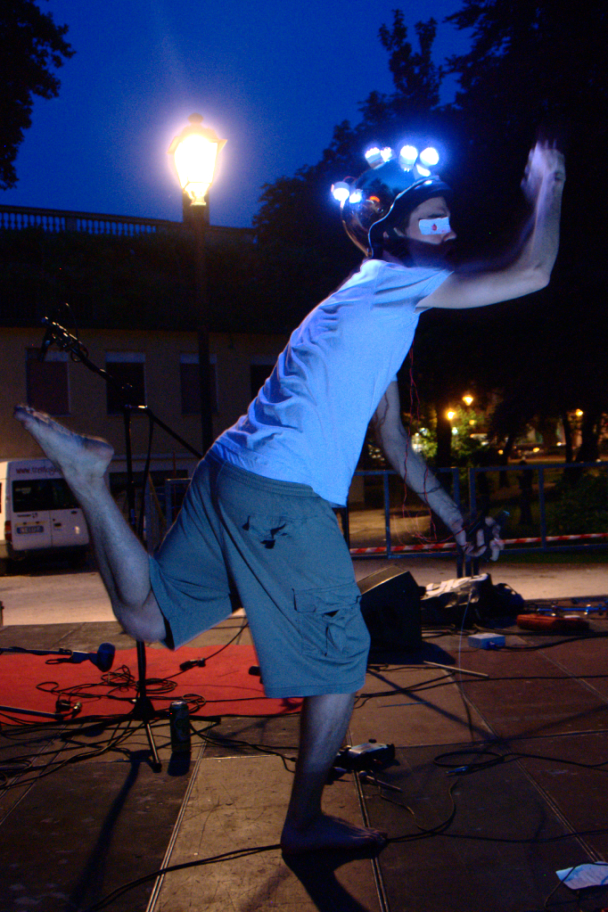 Pop X in concerto in Piazza Dante a Trento. Nella foto Davide Panizza.